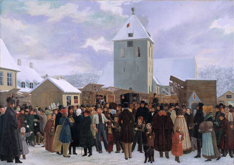 Personer: madam Nubsen, Henrik Wergeland, Johan Fjeldsted Dahl og Erik Røring Møinichen